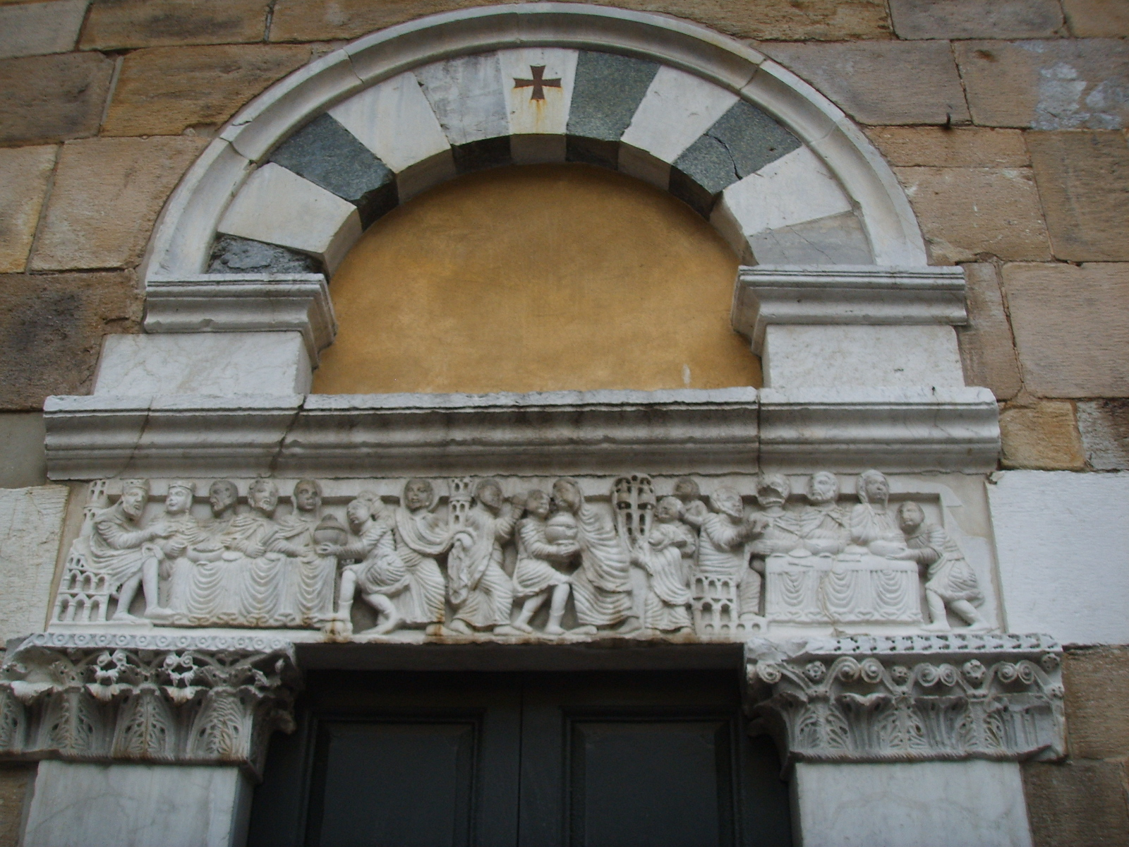 Chiesa di san salvatore, lucca 03 architrave biduino